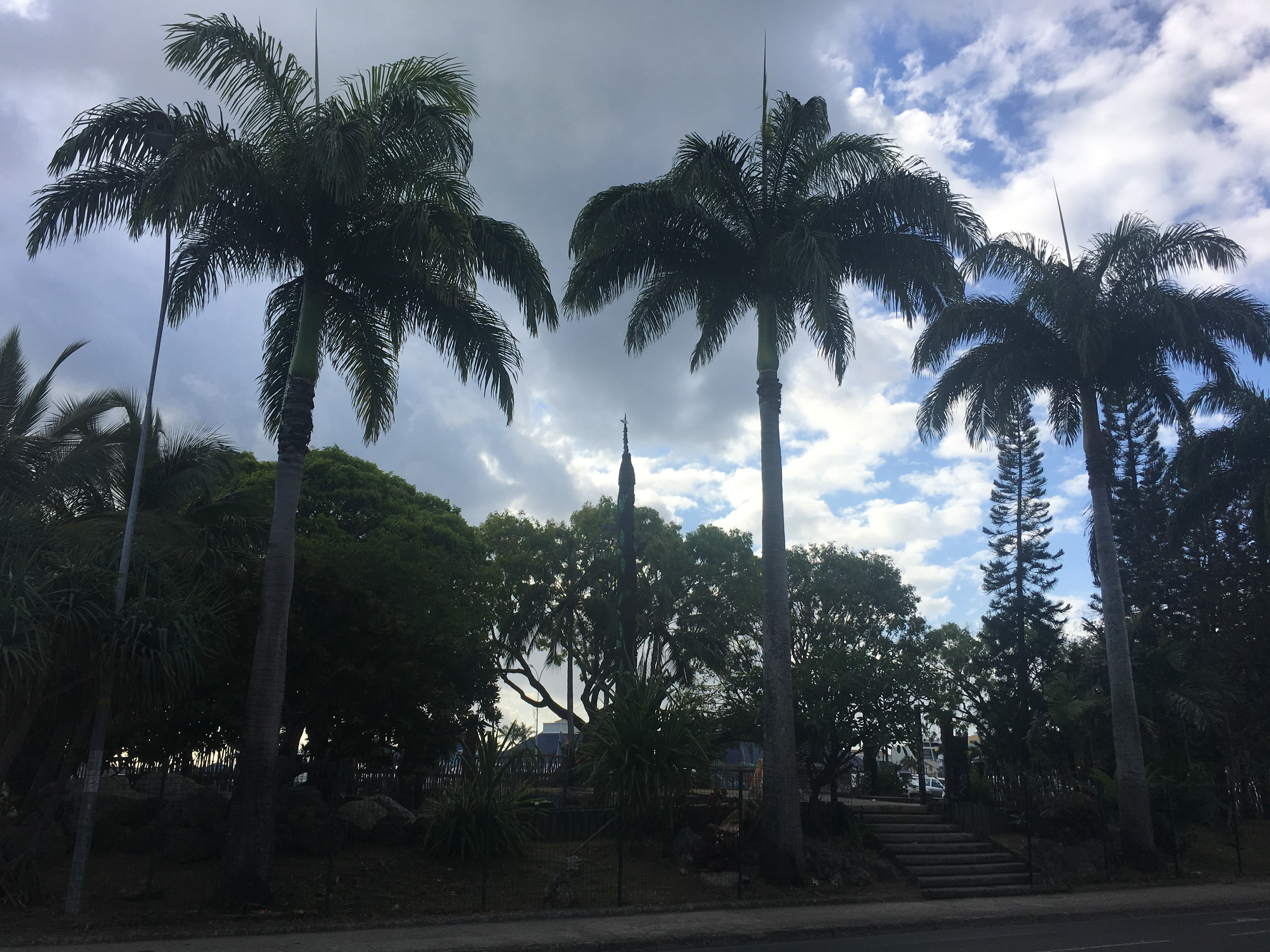 Mwa Kâ, totem érigé à Nouméa en 2005.